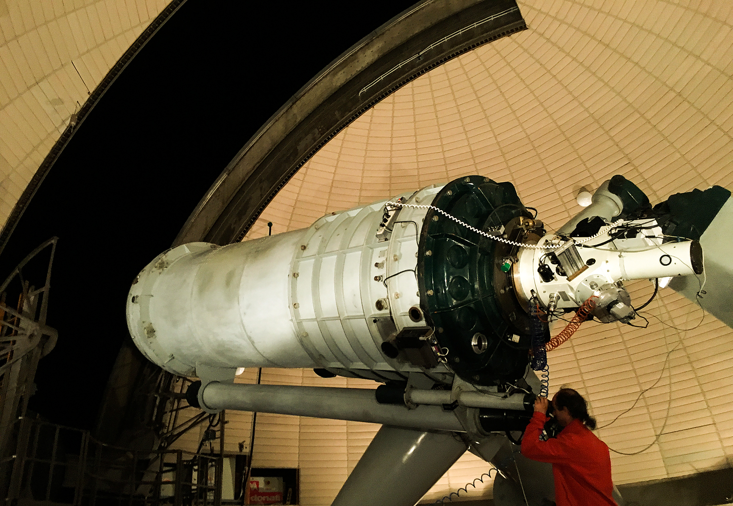 1.22m Galilei telescope at Asiago observatory